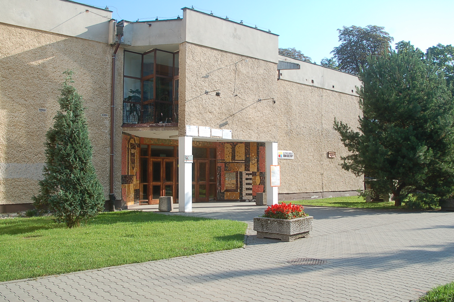 Skwer Matuszkiewicza w Szprotawie